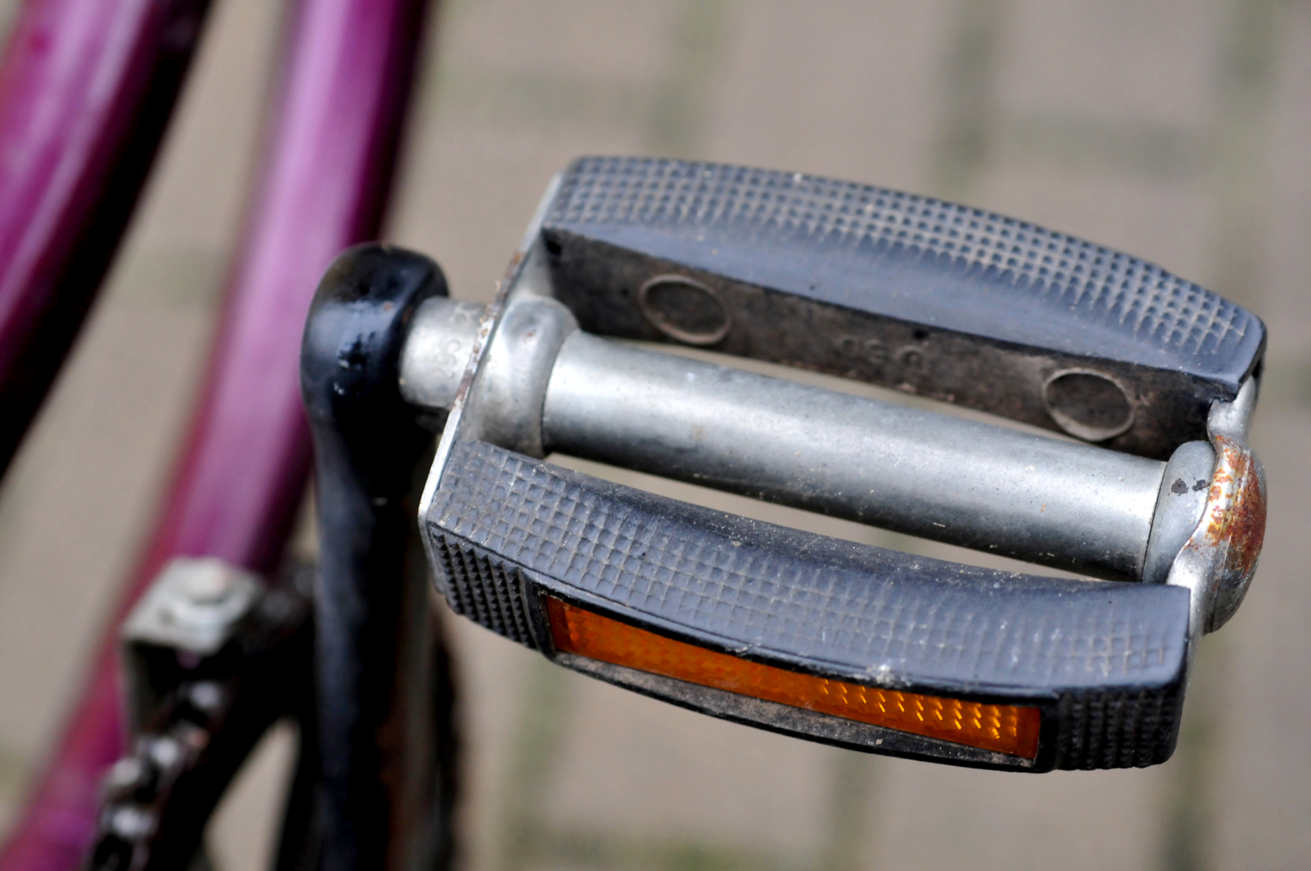 Fahrradkram